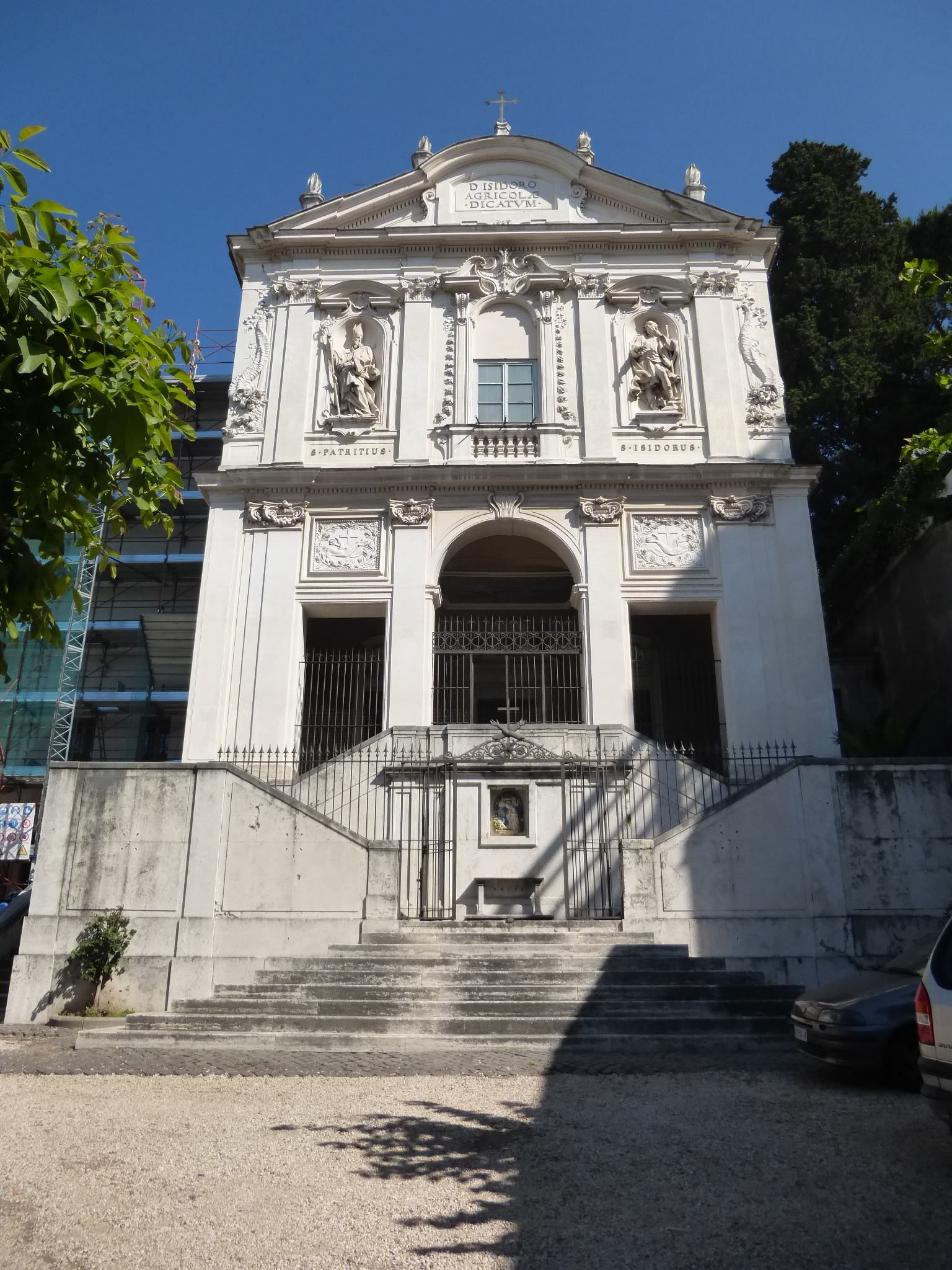 Roma, S. Isidoro, facciata